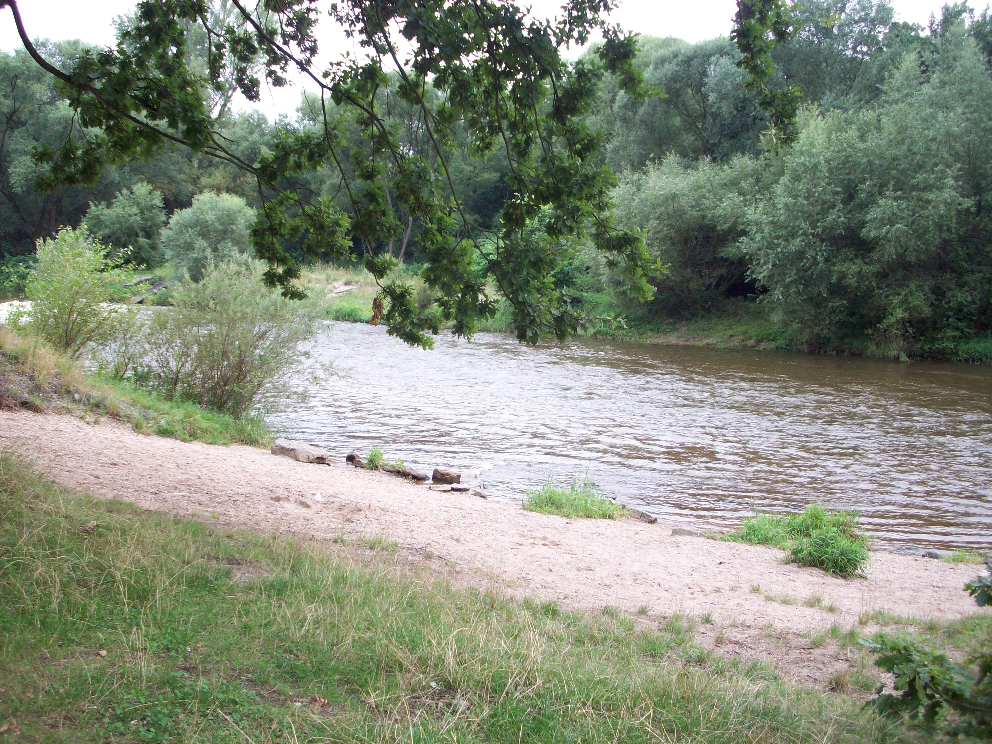 Rzeka Bóbr w Bolesławcu, woj. dolnośląskie